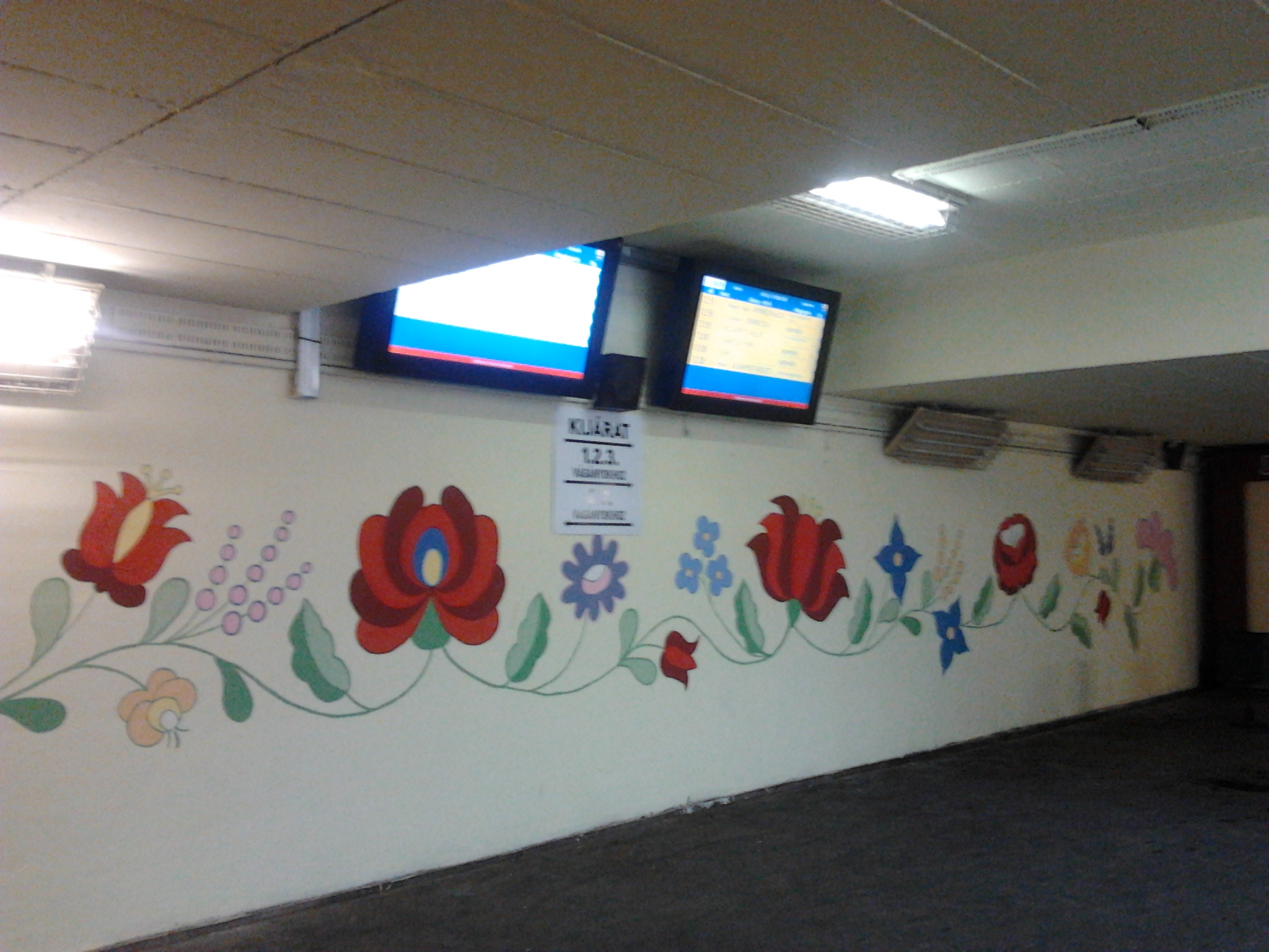 Füzesabony vasúti aluljáró díszített fala 2017-ben. A Füzesabonyi Teleki Blanka Általános Iskola és Alapfokú Művészeti Iskola Blanka festői elnevezésű csapatának „Díszítés népi motívumokkal” című alkotása. [1]